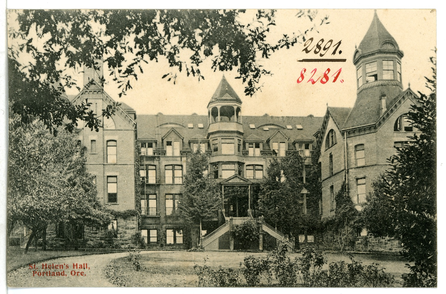 Portland, Ore.; St. Helens Hall This postcard is from publisher Brück & Sohn in Meißen ( This postcard has a unique number 08281 and is available in a higher resolution at the publisher. This images was uploaded in a cooperation project between Wikipedians and the publisher.